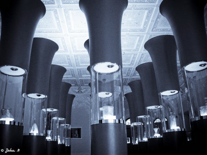 Abgineh Museum Tehran, Iran